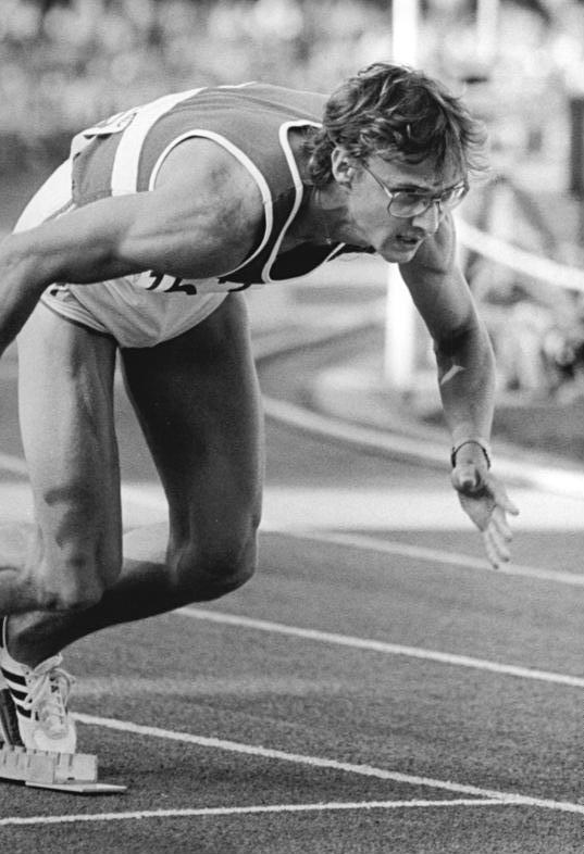 Thomas Schönlebe ADN-ZB Koard 21.8.87-co-Potsdam: 38. DDR-Leichtathletik-Meisterschaften - Der Karl-Marx-Städter Thomas Schönlebe erkämpfte sich mit neuem Europarekord von 44,48 Sekunden über 400 Meter den DDR-Meistertitel.